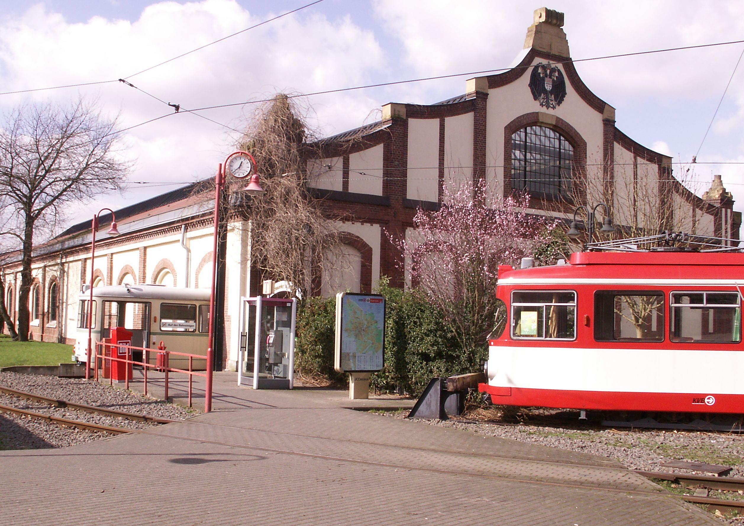 kvb